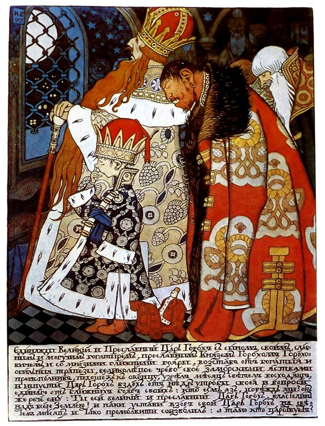 Царь Горох. Обложка журнала «Жупел»